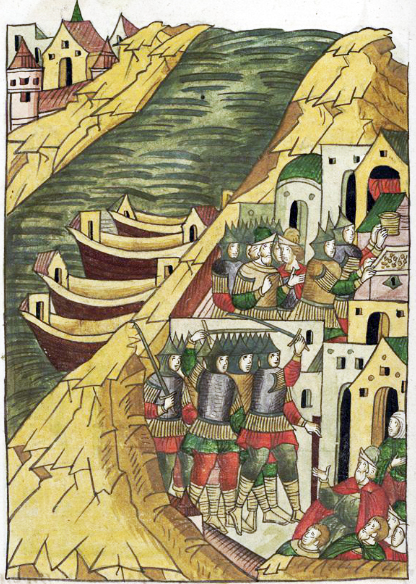 ЛИЦЕВОЙ ЛЕТОПИСНЫЙ СВОД В том же году новгородцы из Великого Новгорода, ушкуйники-разбойники, захватили Кострому.